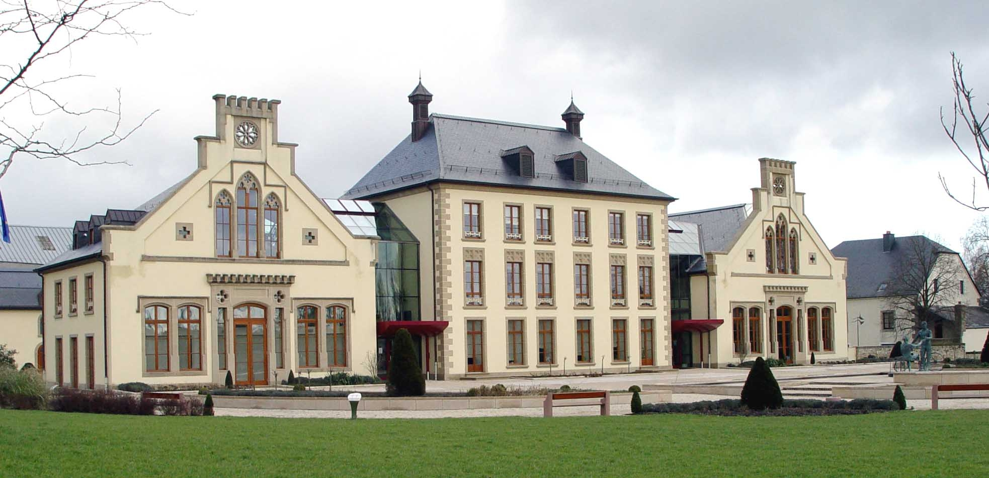 Mamer Gemeng. Kategorie:Gemeng Mamer